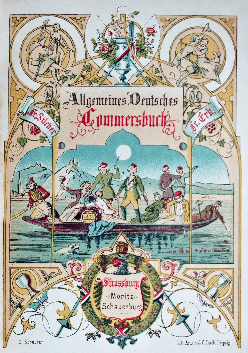 Zur Wiedereröffnung der Straßburger Universität nach dem Deutsch-Französischen Krieg brachte der Verlag Moritz Schauenburg die 16. und 17. Auflage mit diesem Titelbild heraus.